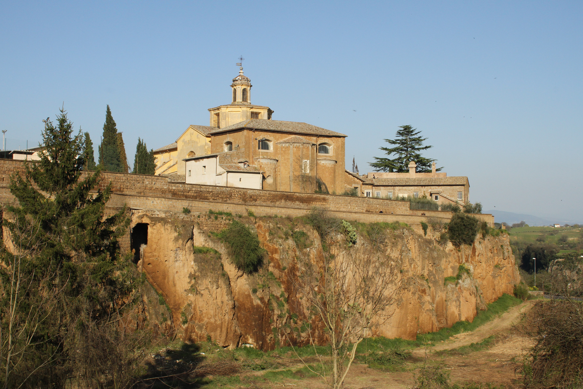 Panorama delle mura di Civita Castellana